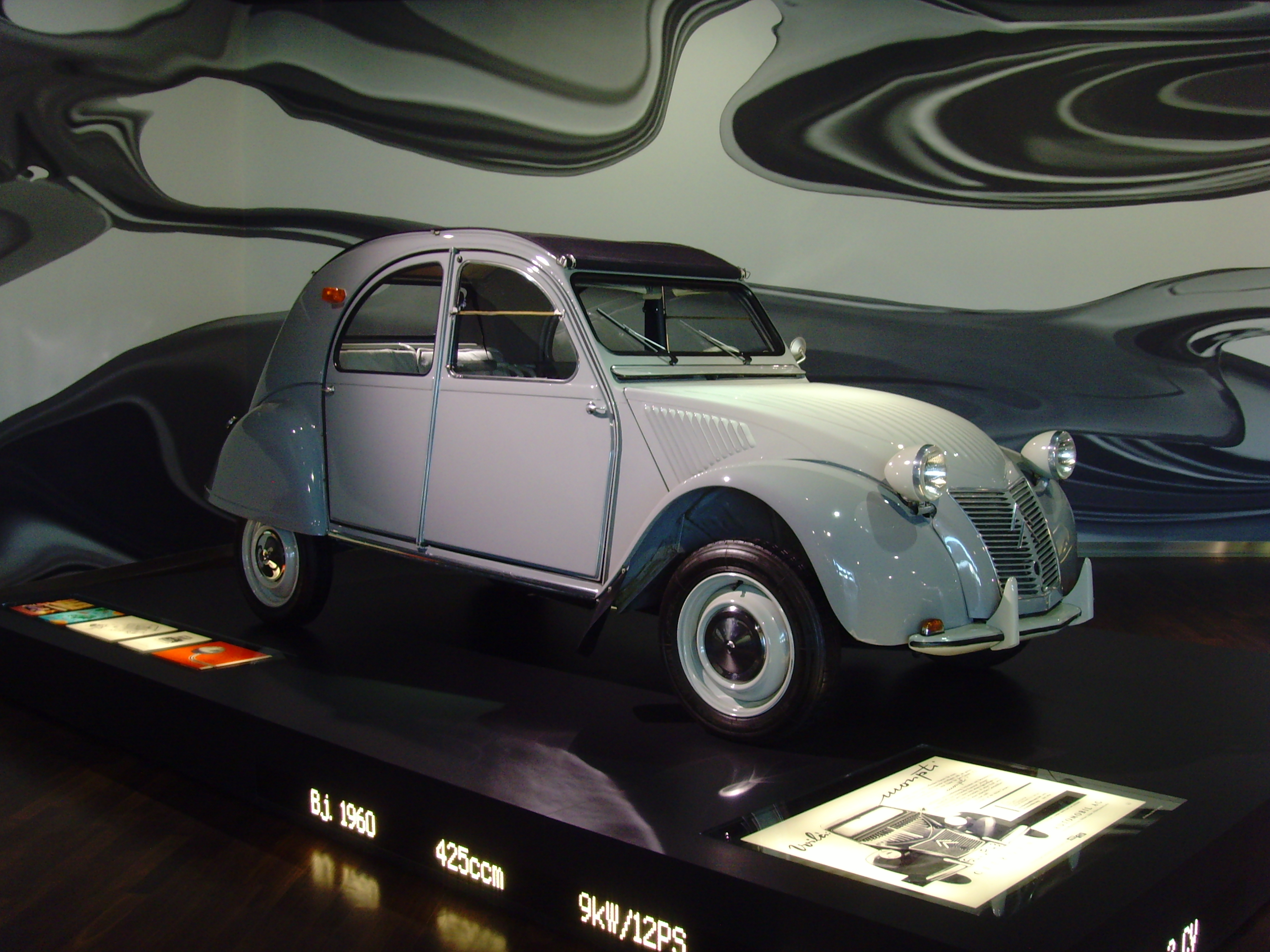 Autostadt Wolfsburg - ZeitHaus - Citroen 2CV 1960